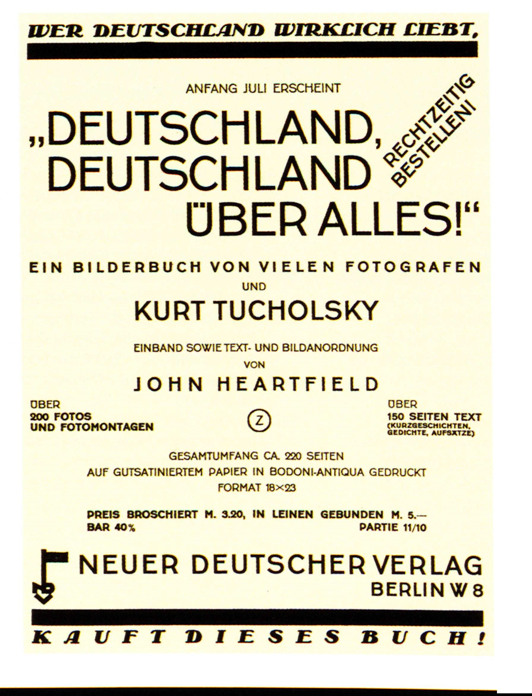 292 Kurt Tucholsky Deutschland Anzeige 1929